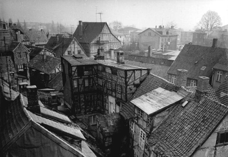 Schwerin, Großer Moor, Fachwerkhäuser ADN-ZB 19.5.1987-Schwerin: Großer Moor, ältestes Siedlungsgebiet der Stadt, im Jahre 1975. Nach umfangreicher Rekonstruktion und innerstädtischem Neubau entstanden hier moderne Wohnungen und zahlreiche gesellschaftlche Einrichtungen.